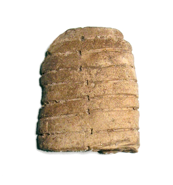 Tavoletta enigmatica di forma subovale caratterizzata dalla presenza di linee incise orizzontali e parallele con un puntino al centro.